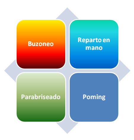 servicios relacionados con el buzoneo